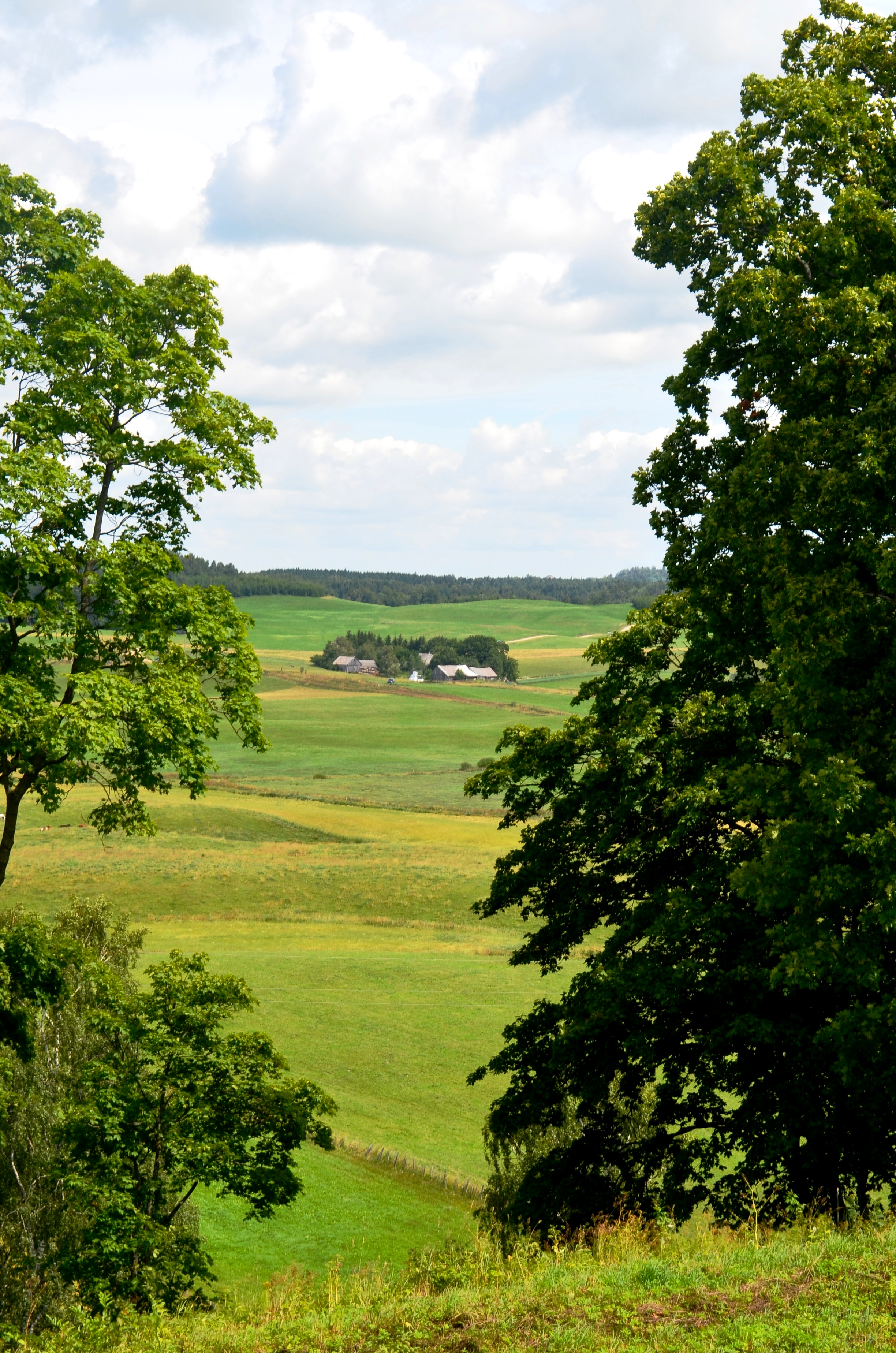 Aukštagirė nuo Bilionių piliakalnio, Šilalės r. Žemaitėška: Aukštagėrė veizont i šiaurė nug Bėliuoniu pėliekalnė, Šėlalės raj.